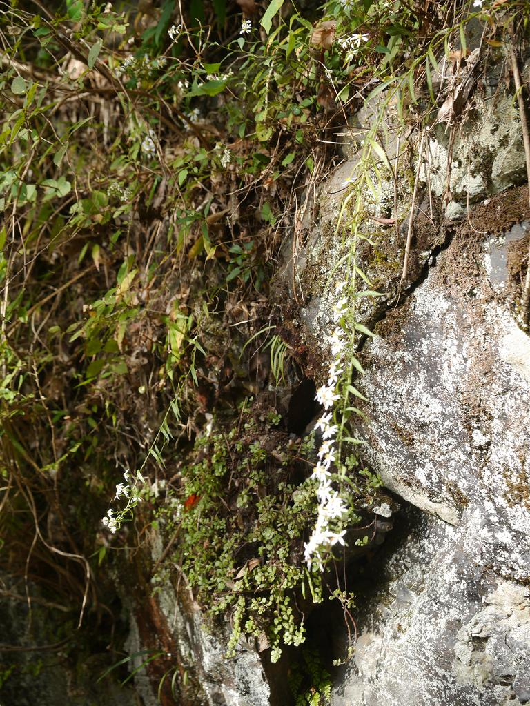 Aster tenuipes：クルマギク 2017/11/03 和歌山県田辺市：Tanabe City. Wakayama Pref. Japan